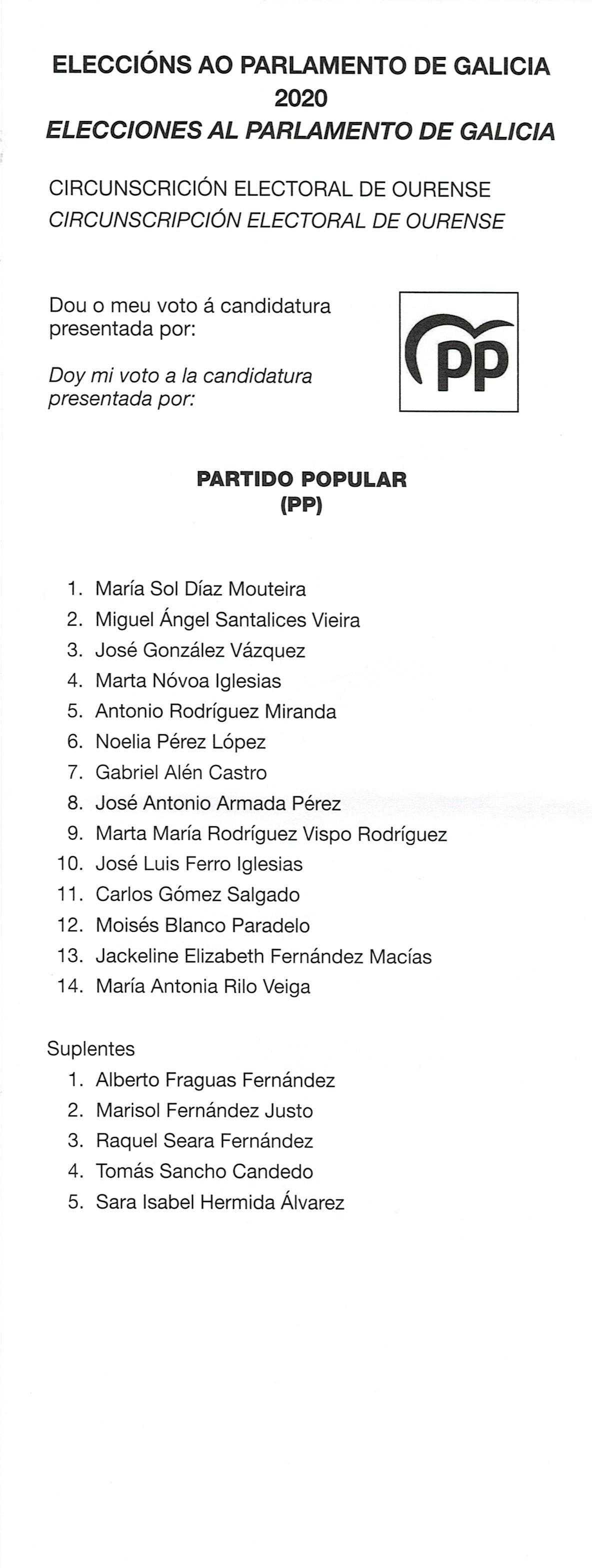 Papeletas electorais Eleccións ao Parlamento de Galicia 2020 pospostas circunscrición electoral de Ourense-PP